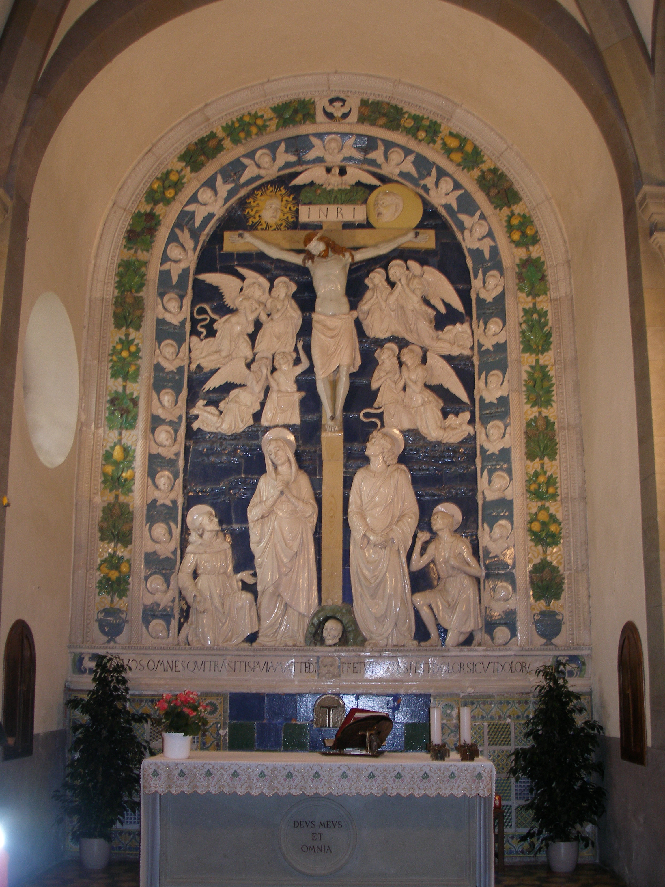 La Verna